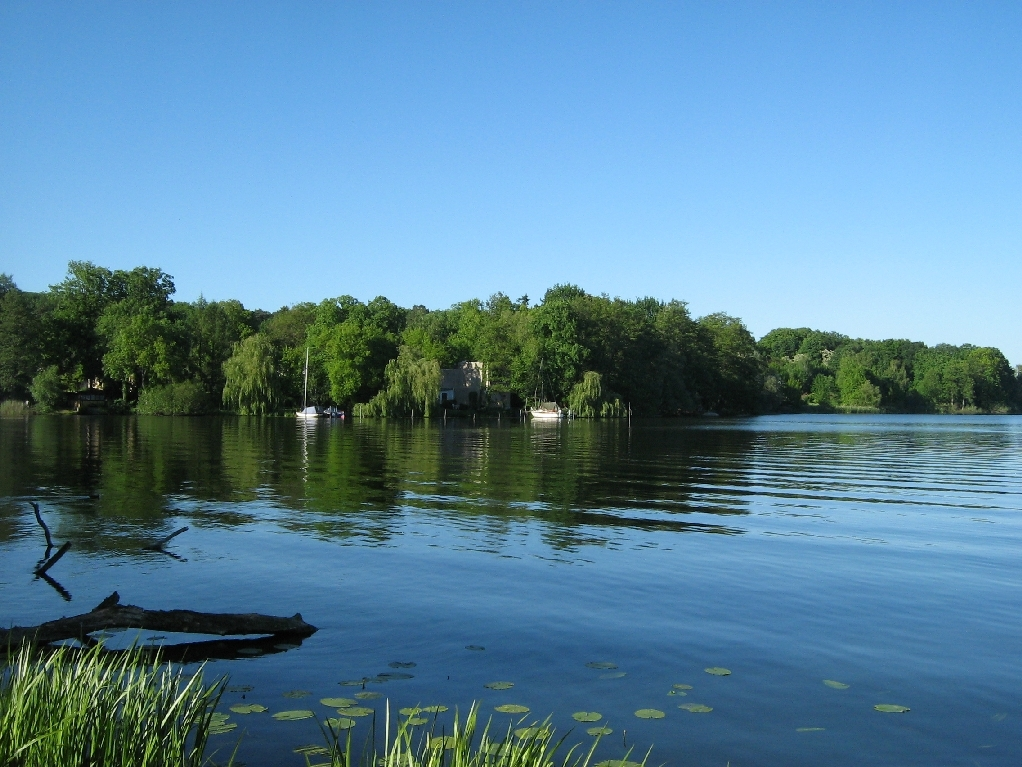 Der Jungfernsee bei Nedlitz in (Potsdam, Brandenburg, Germany).